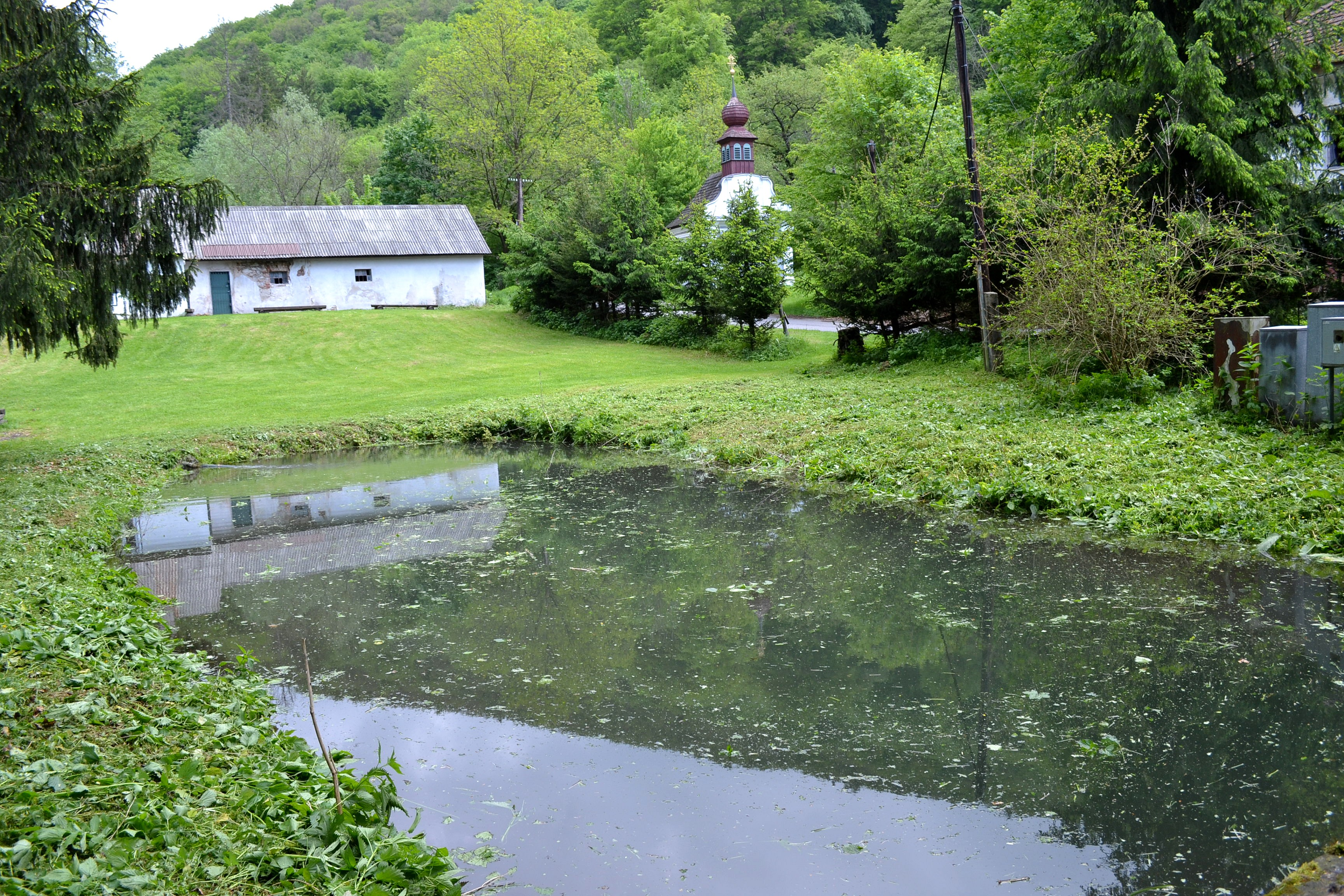 Pohľad na časť areálu Medených Hámrov; vpravo v pozadí kaplnka svätého Michala